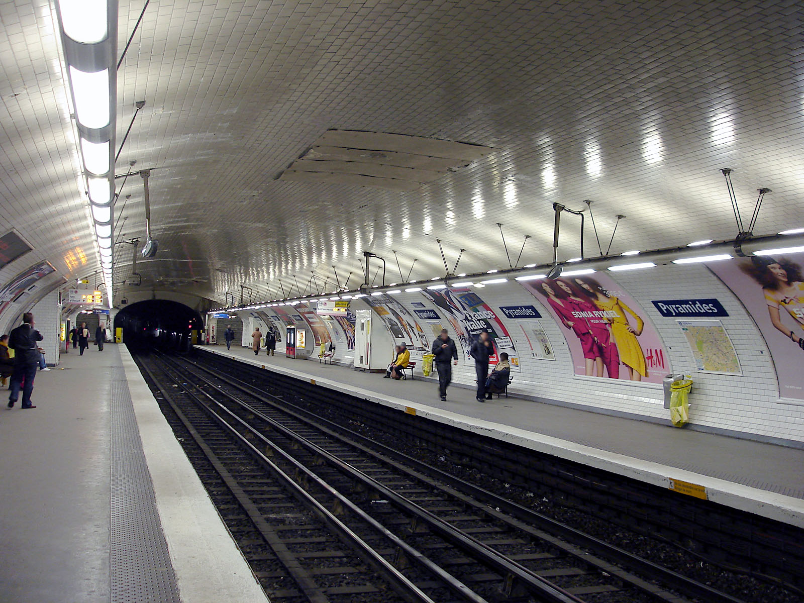 La station Pyramides de la ligne 7 du métro de Paris, France.